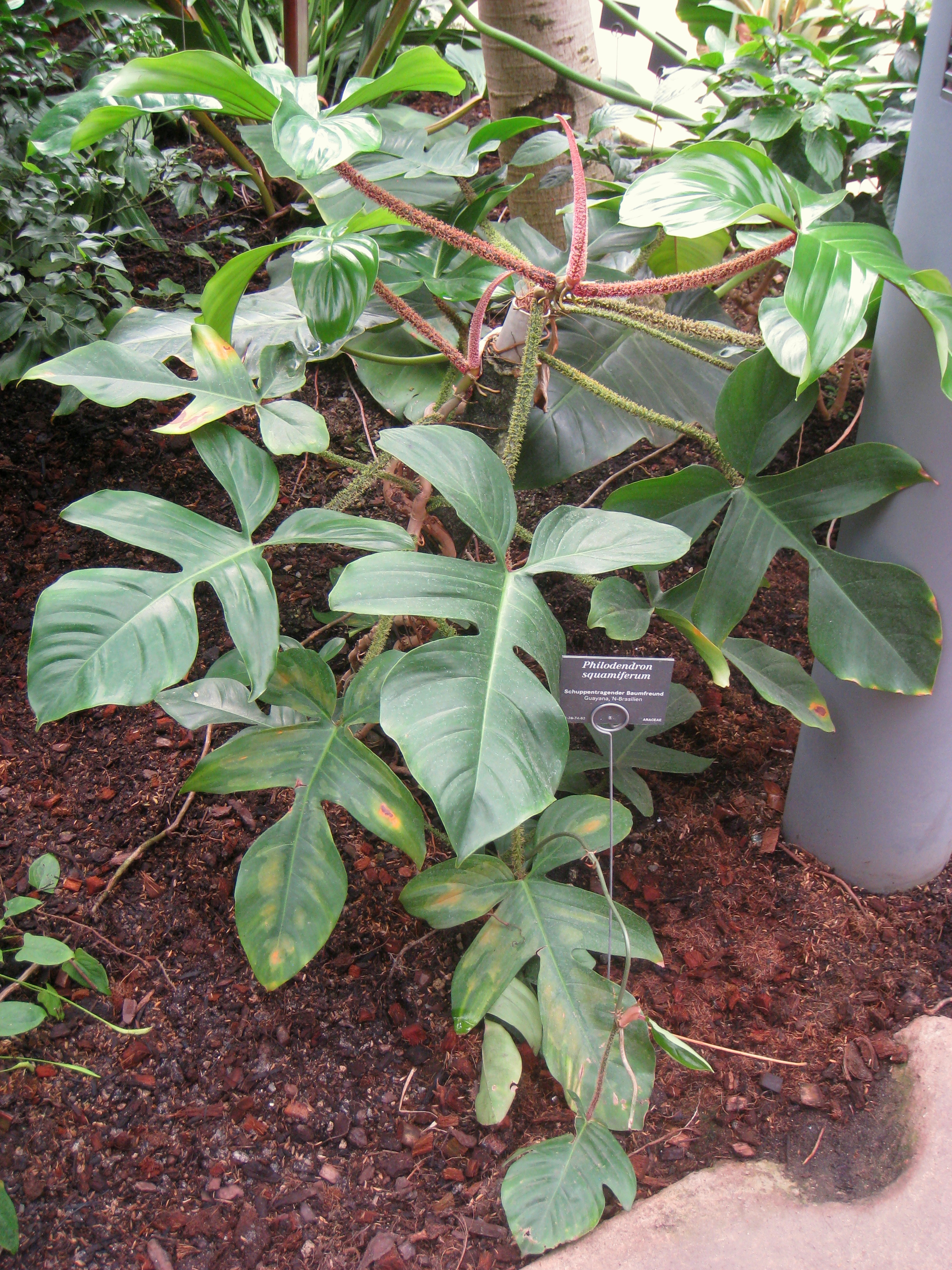 Philodendron squamiferum specimen in the Botanischer Garten, Berlin-Dahlem (Berlin Botanical Garden), Berlin, Germany.